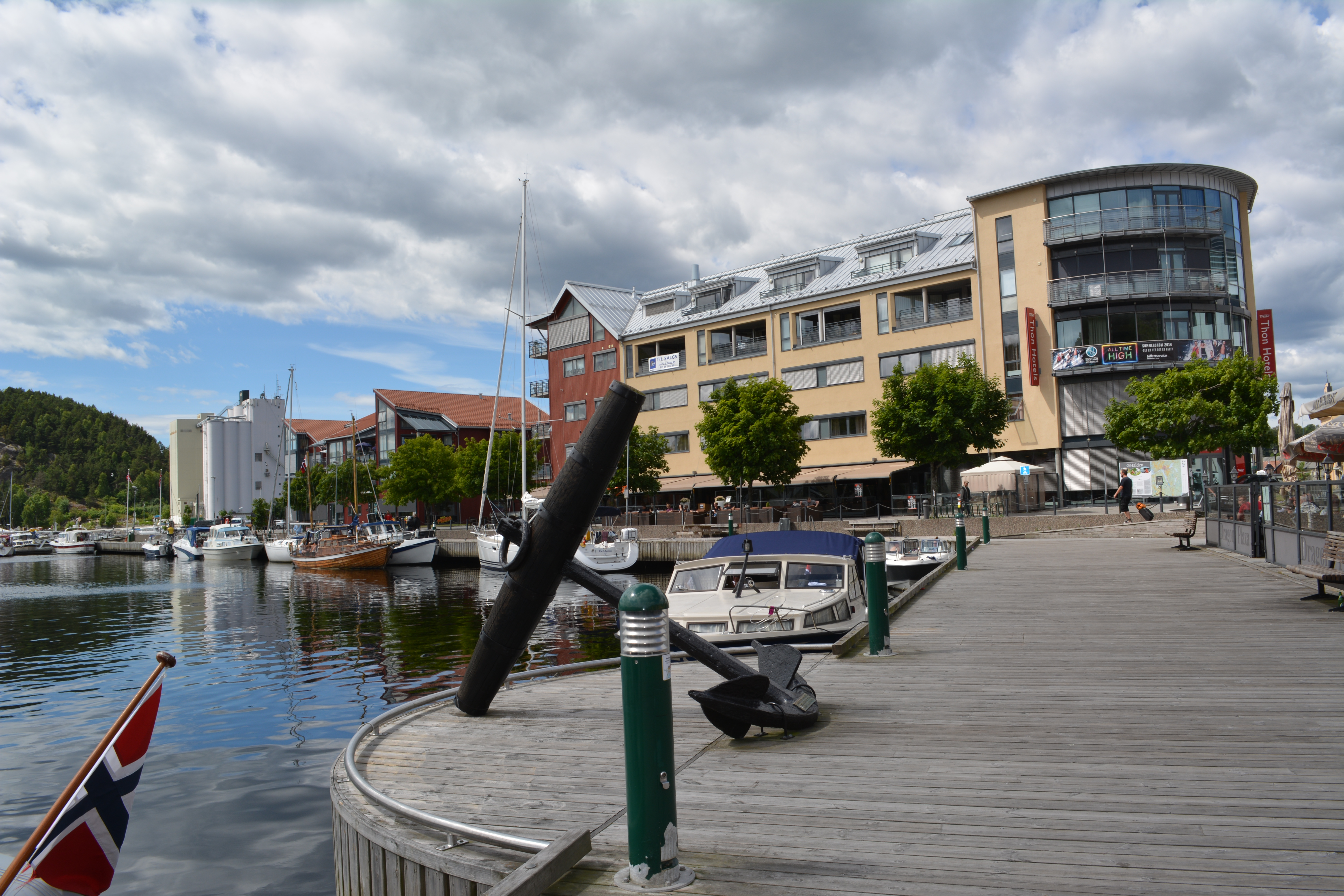 Brygge am alten Stadthafen von Halden